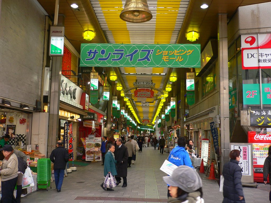 蒲田駅西口の商店街・「蒲田西口商店街」[1]「サンライズ ショッピングモール」（東京・大田区西蒲田7-66-6 の「名代 富士そば」付近）